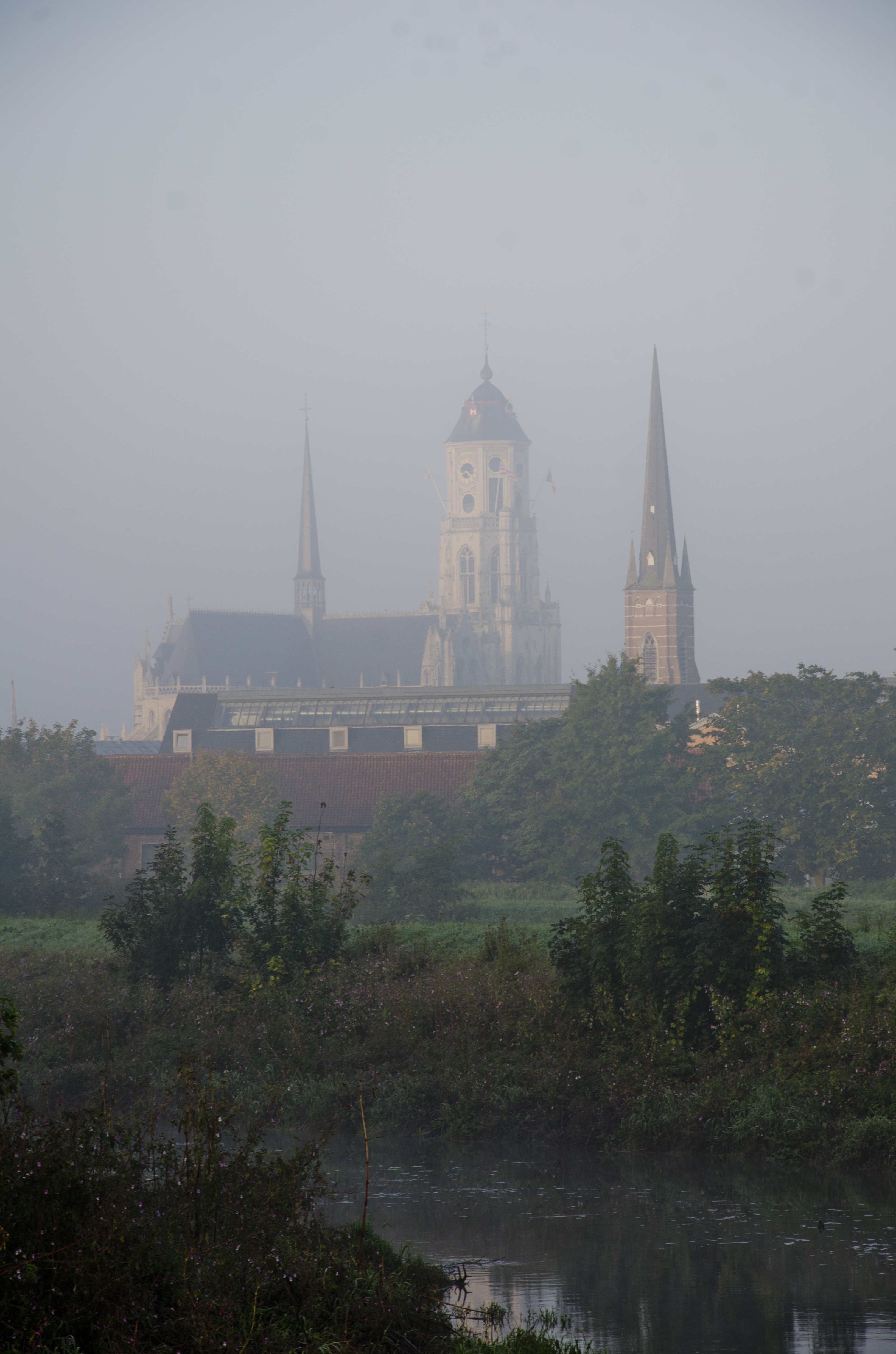 Sint-Gummaruskerk (links) en Kluizekerk (rechts) te Lier.